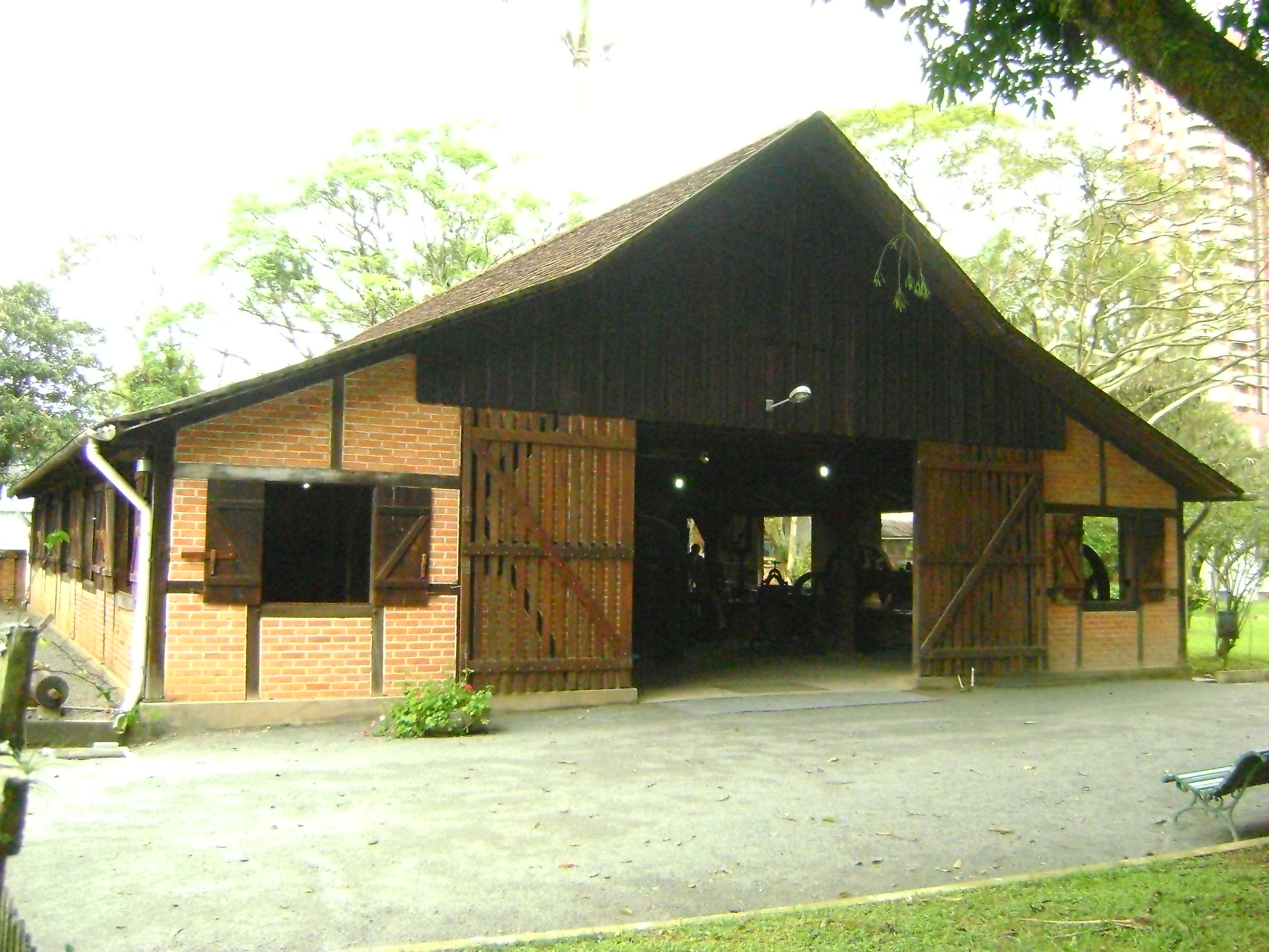 Galpão de Tecnologia do Museu Nacional de Imigração e Colonização de Joinville.